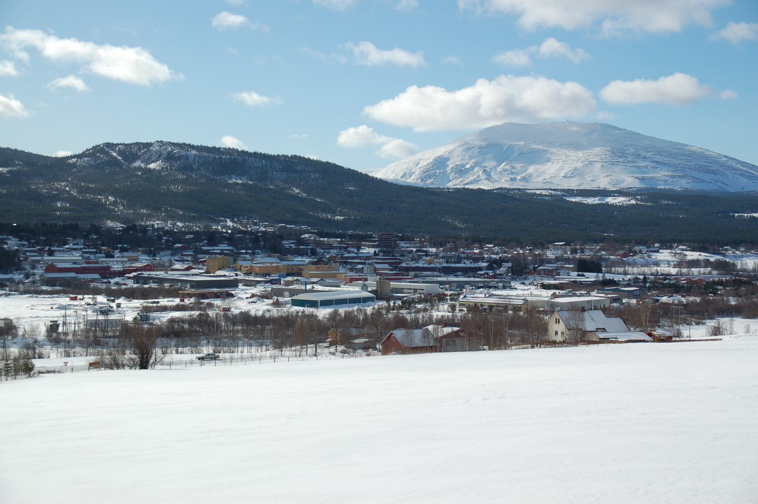 Village of Tynset, seen from NW, Tynset, Hedmark, Norway